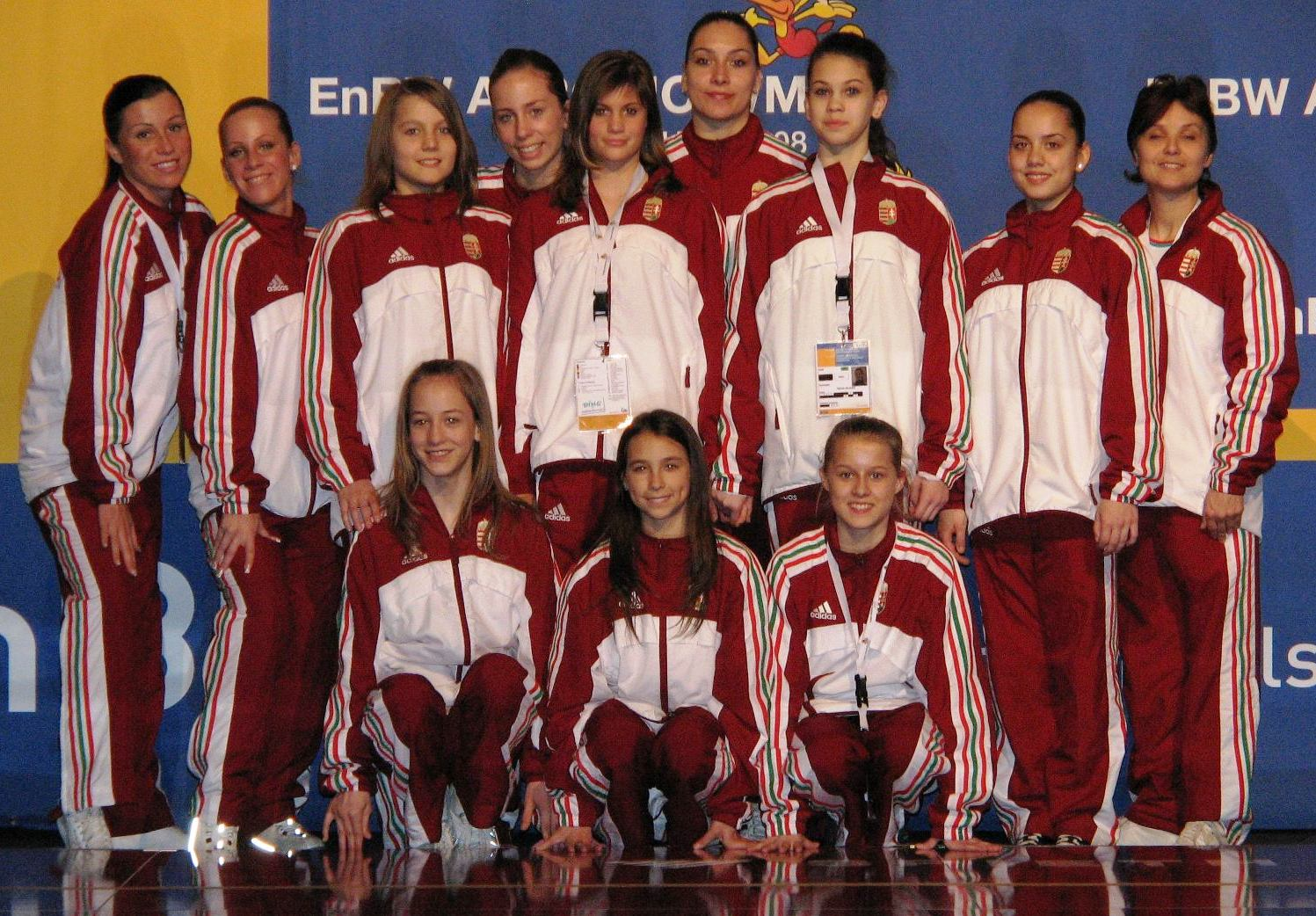 Fájl:Bucsánszki Linda4.jpg